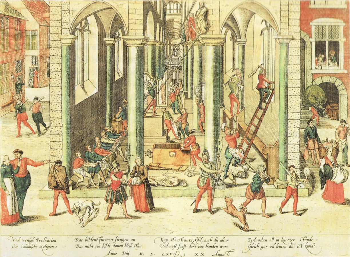 Frans Hogenberg: The Calvinist Iconoclastic Riot of August 20, 1566 (Hamburg, Kunsthalle). Text: Nach wenigh Predication / Die Calvinische Religion / Das bildenssturmen fiengen an / Das nicht ein bildt davon bleib stan / Kap Monstrantz, kilch, auch die altar / und wess sonst dort vor handen war / Zerbrochen all in kurtzer stundt / Gleich gar vil leuten das ist kundt. Anno Dnj. M. D. LXVI XX Augusti